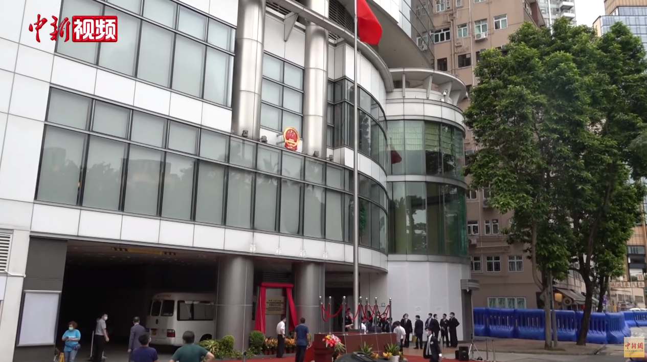 7月8日，中央人民政府驻香港特区维护国家安全公署揭牌